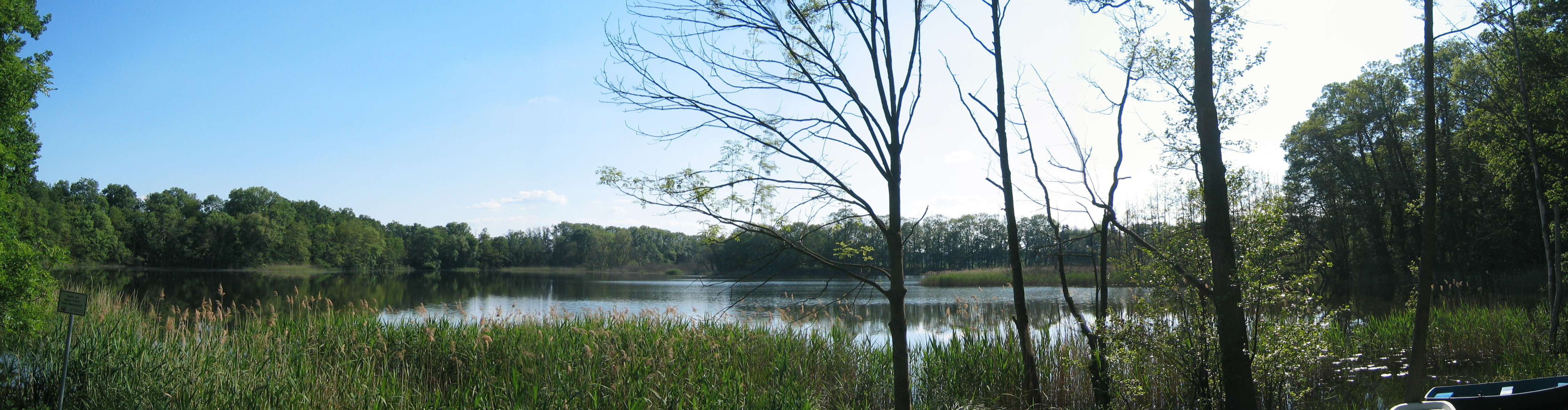 Großer Kaulsee in Schmiedeberg in der Uckermark.